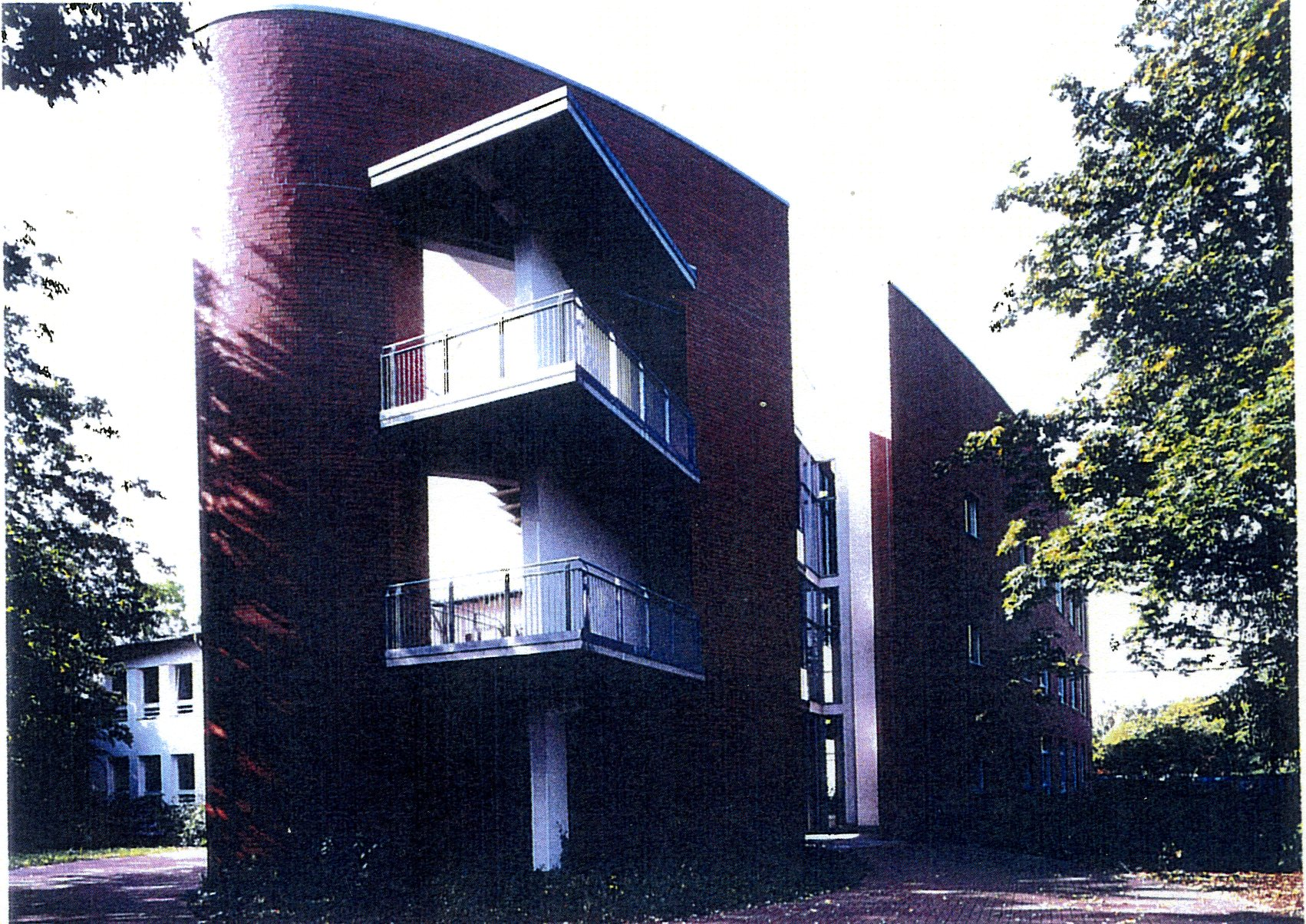 Nord/Ostfassade